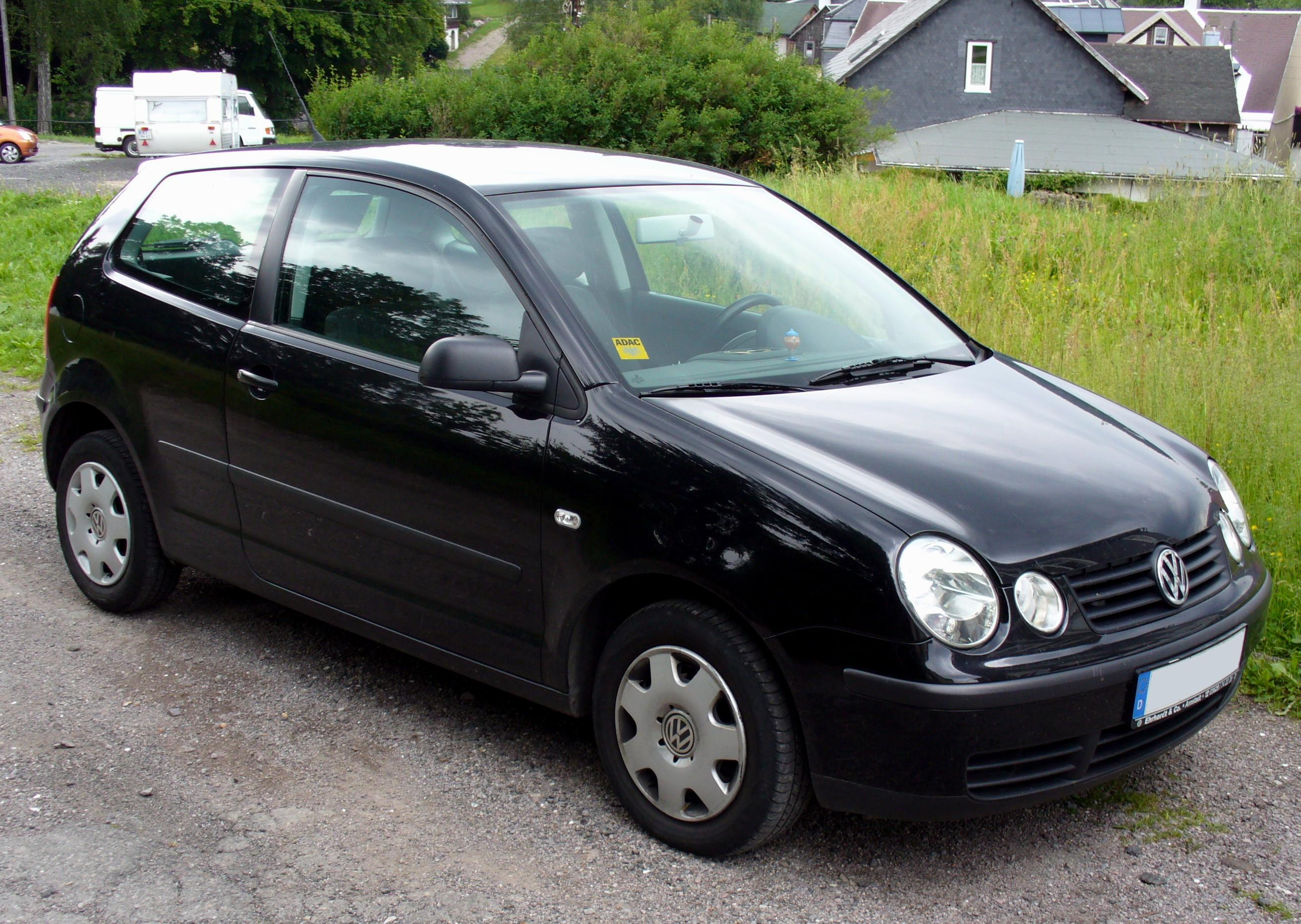 VW Polo 9N